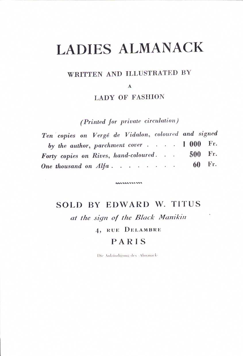 Djuna Barnes Ladies Almanack advertisement 1928